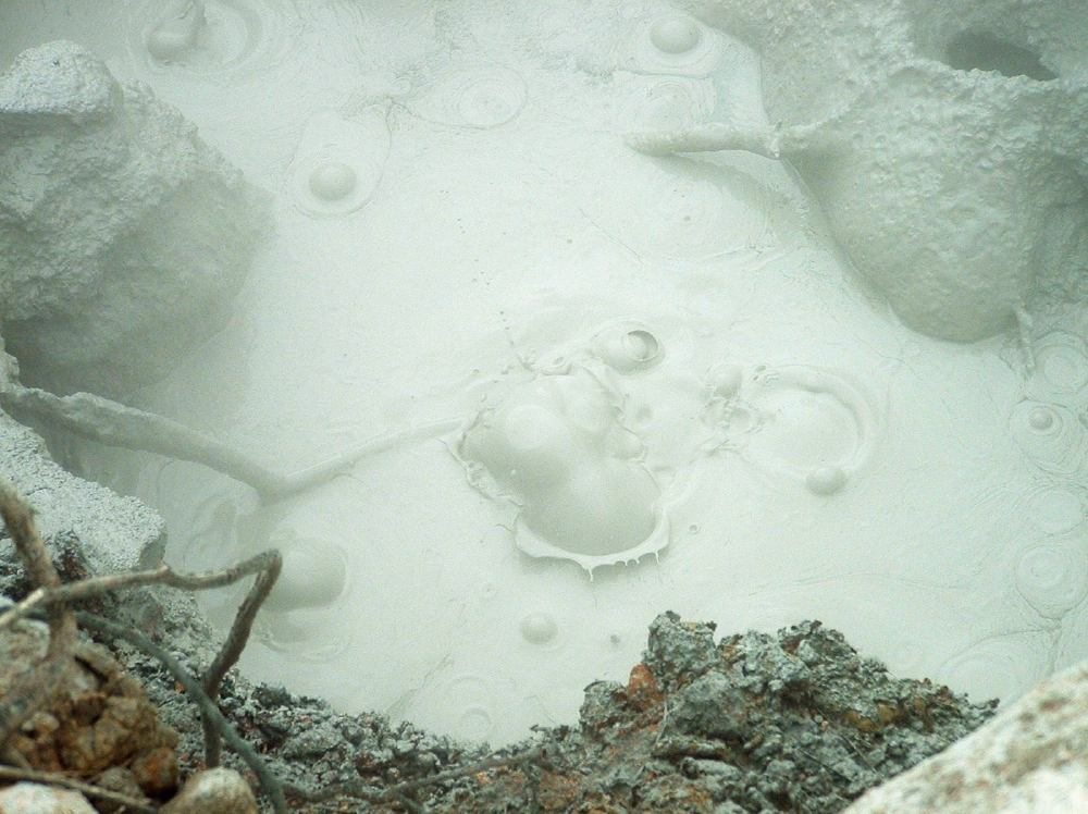 Mudpot at Rincón de la Vieja Volcano National Park, Costa Rica